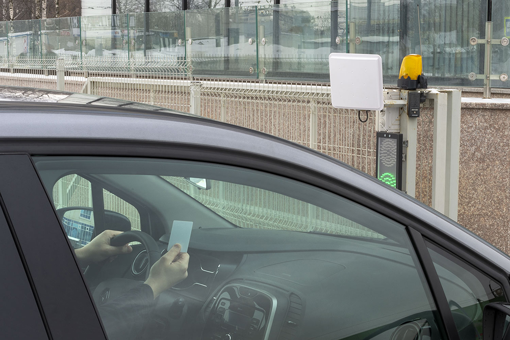 Считыватель дальнего действия PERCo SAAT-I801M